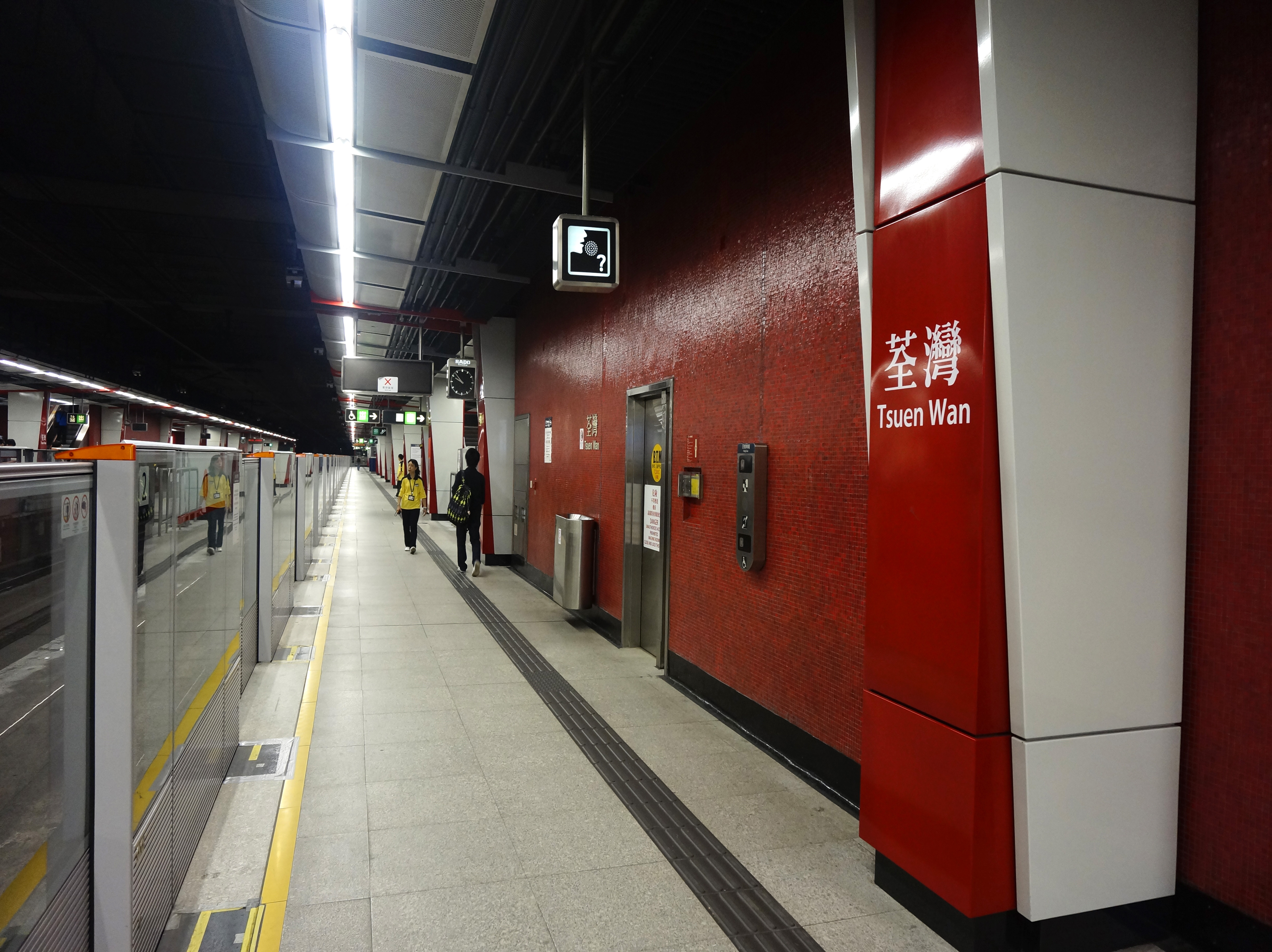 荃灣港鐵站月台